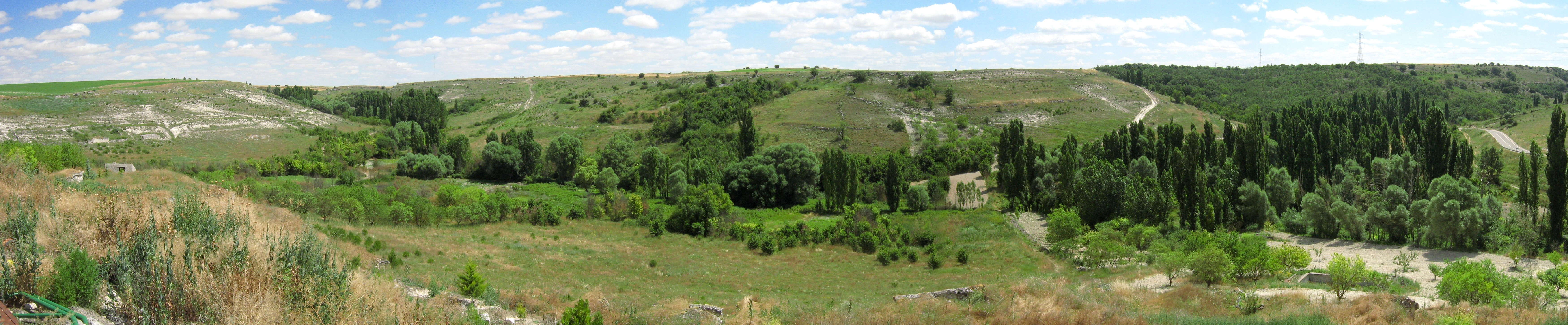 Valle del Cuco. Vista desde San Llorente. Valle de Jarrubia (Izda). Robledal (Derecha).